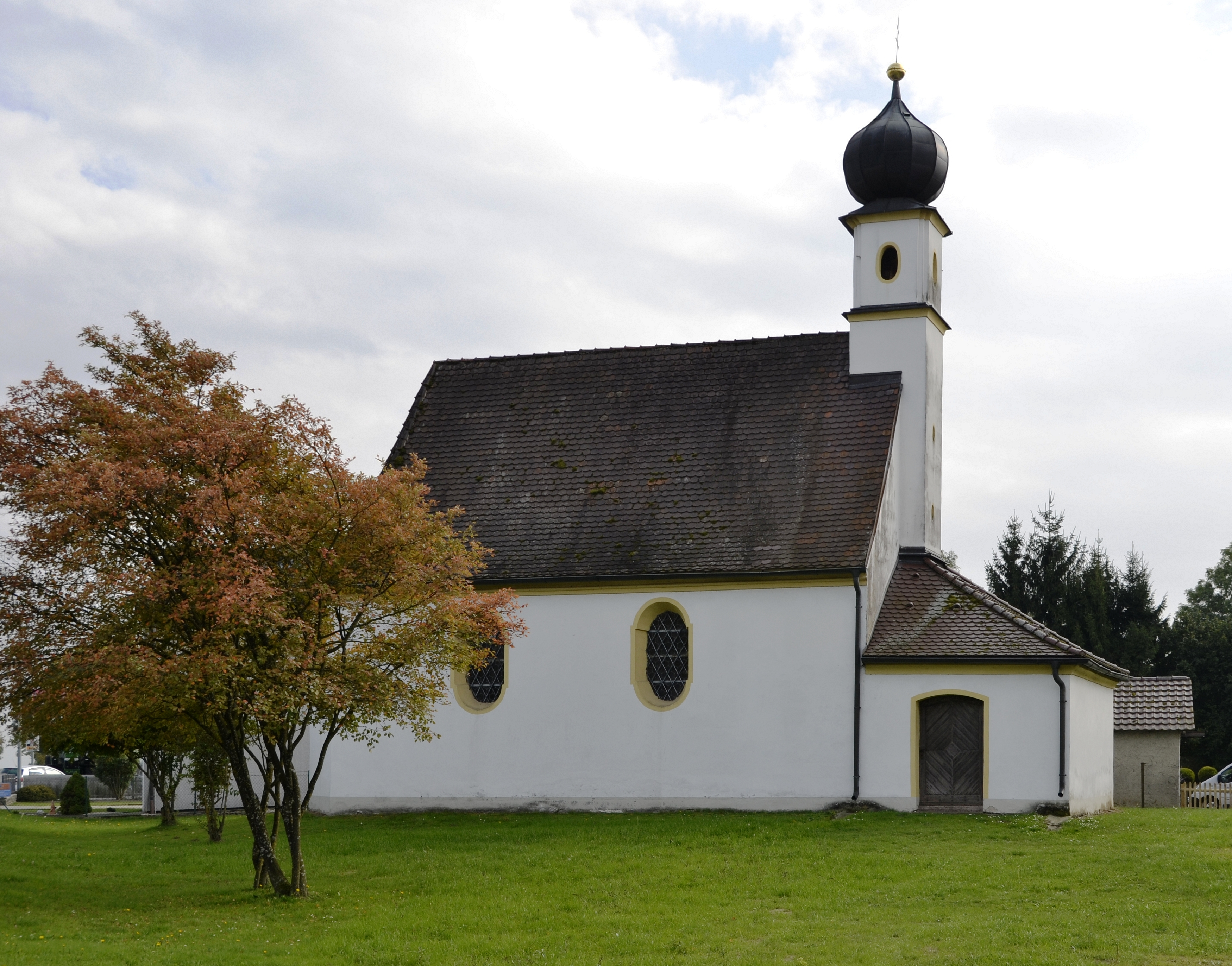 Die Kapelle St. Johannes der Täufer (Bundesstraße 43) in Langenisarhofen/Moos.